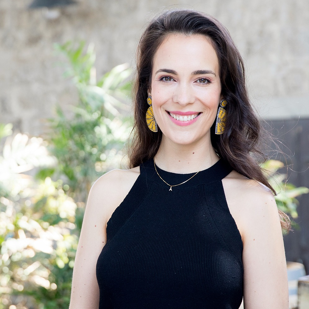 Alina Stiegler bei den Arbeiten zum Eurovision Songcontest 2019 in Tel Aviv. Fotografiert von NDR Fotografin Claudia Timmann.